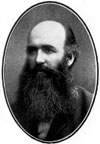 Julius Krister (1848—1916), gardener in Kiev